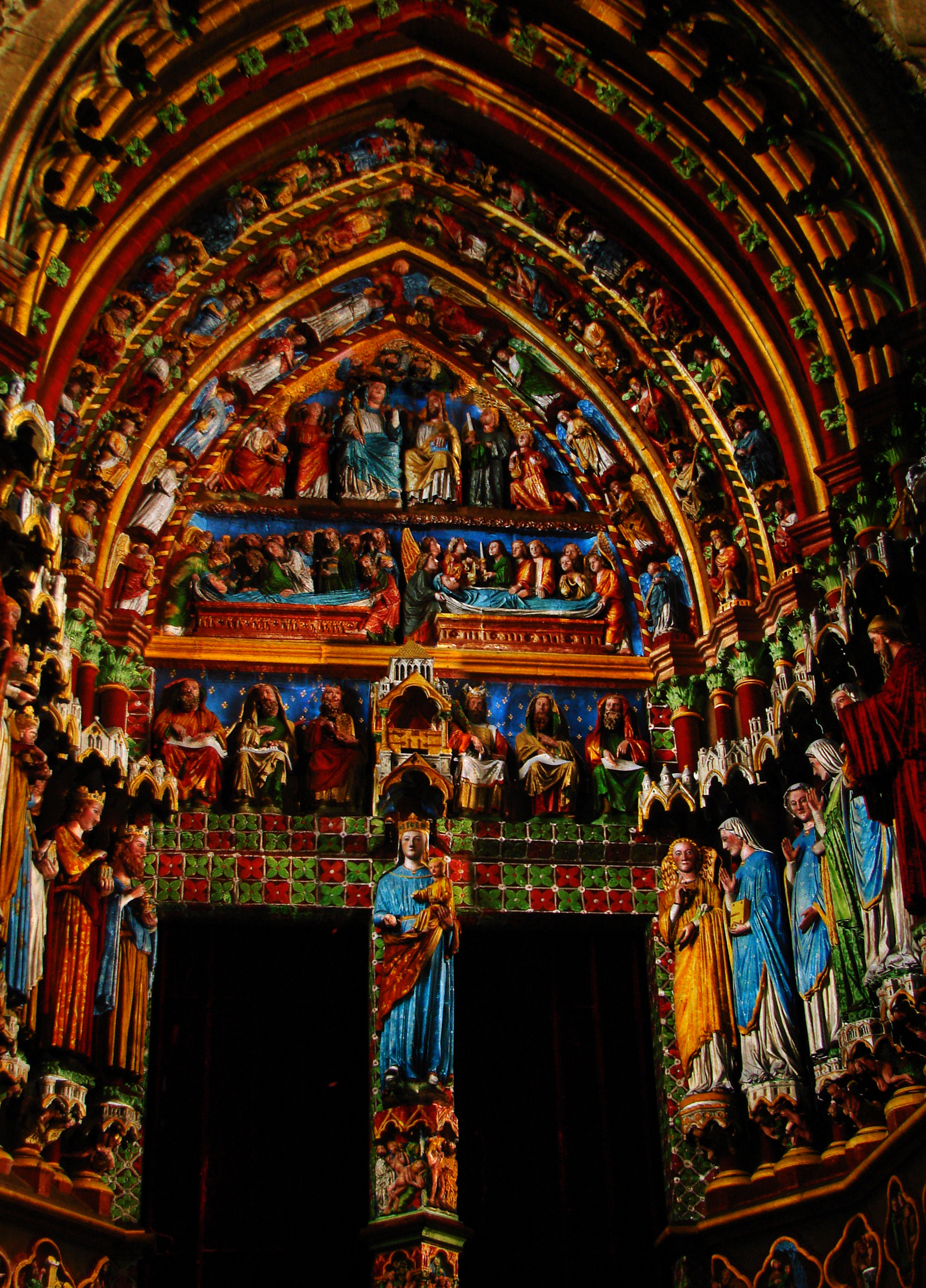 Façade de la cathédrale Notre-Dame d'Amiens pendant le son et lumière: le portail de droite. Ce spectacle gratuit a lieu tous les soirs, de Juin à Septembre 2008, ainsi qu'en Décembre 2008 et en Janvier 2009. Il reconstitue la polychromie des statues par projection lumineuse, réalisée par la société Skertzo (à contacter pour une utilisation des photos).